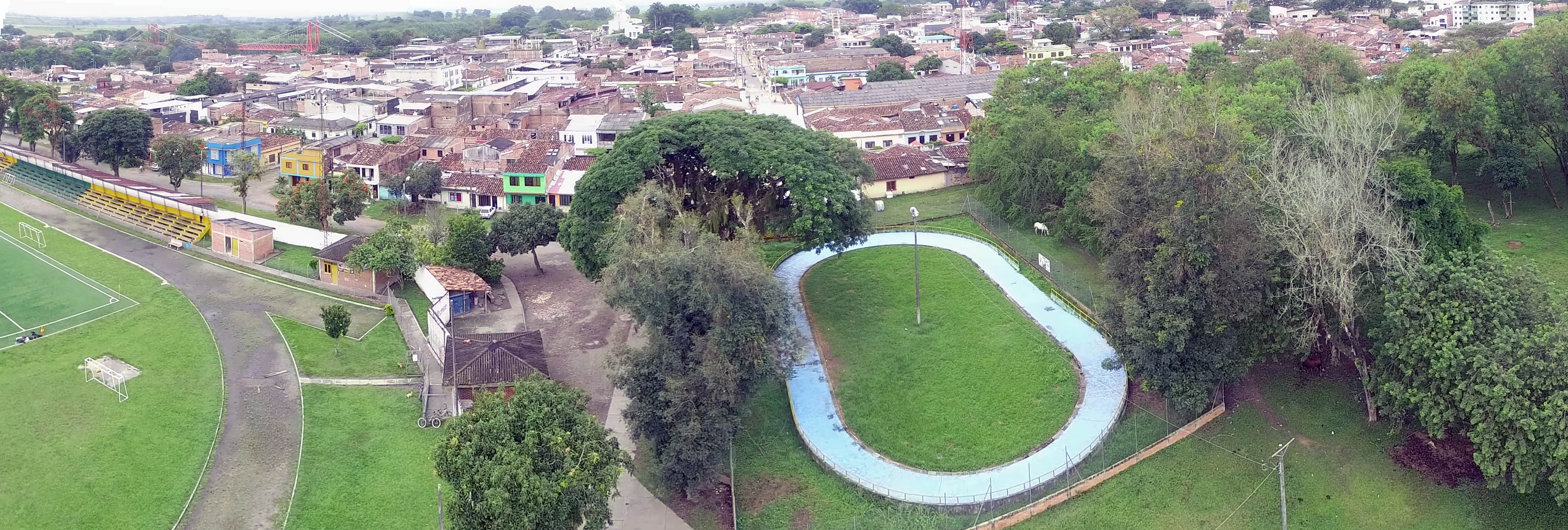 Imagen panorámica de La Virginia(Risaralda), Colombia